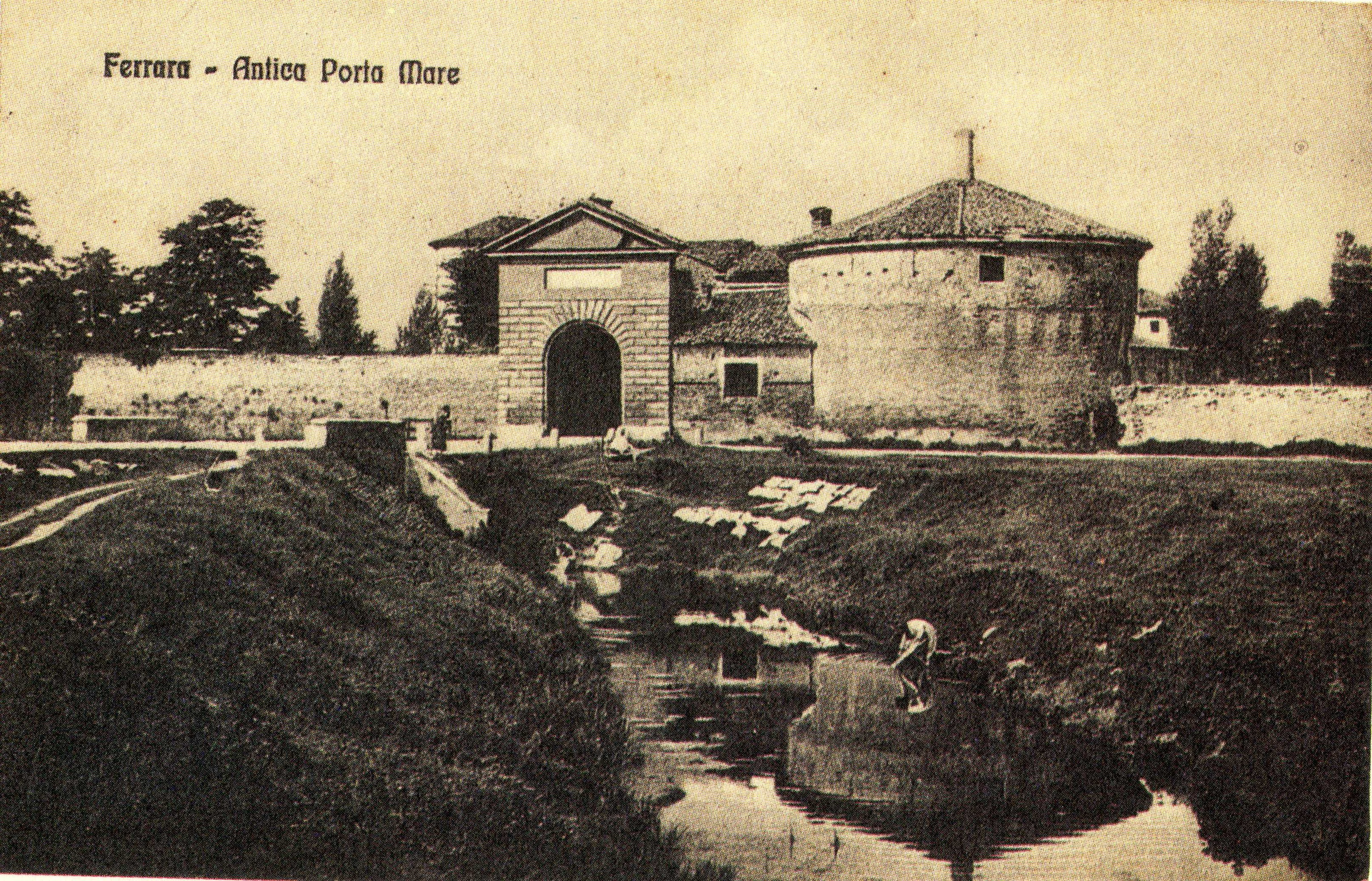 Porta Mare detta anche Porta S. Giovanni, demolita nel 1909